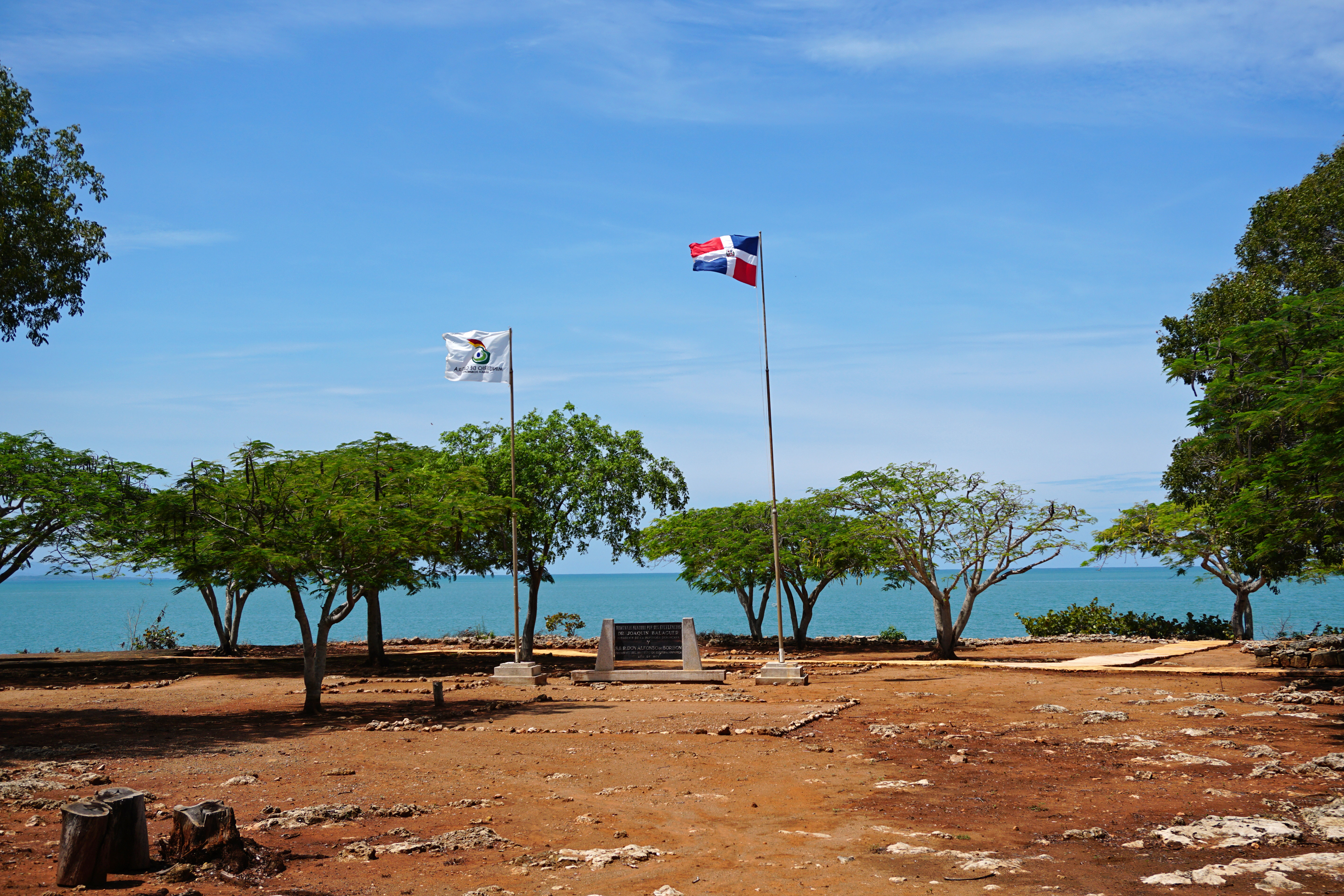 Parque Nacional Histórico y Arqueológico de La Isabela, Luperón, República Dominicana